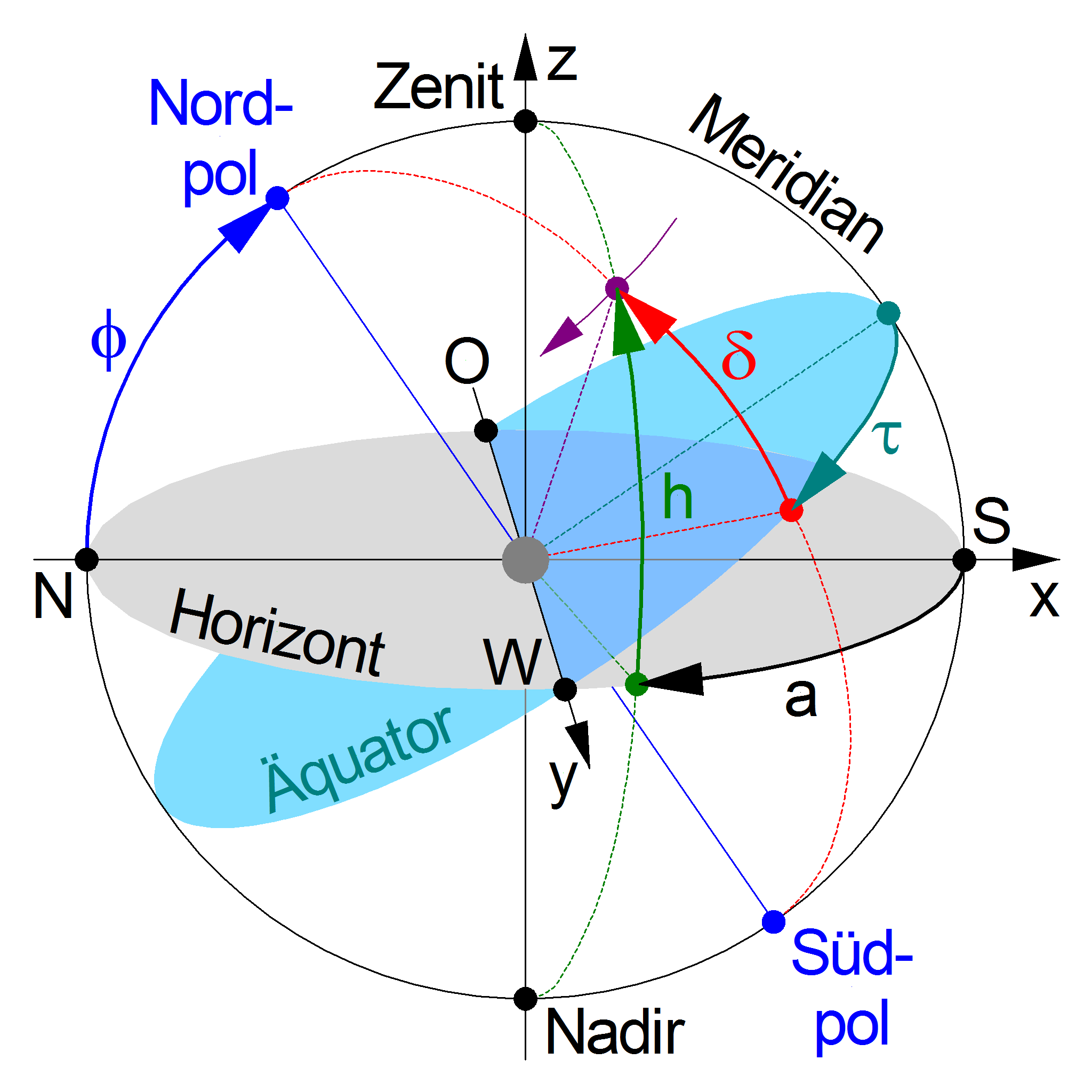 Der Zenit ist senkrecht über dem Beobachter und der Nadir senkrecht unter dem Beobachter im Zentrum der Darstellung. Der Meridian ist der Großkreis durch Himmelsnord- und Himmelsüdpol sowie die Richtungen Norden (N) und Süden (S) vom Beobachter aus gesehen. Der Beobachter sieht im Horizontalsystem (graue Scheibe) am Himmel einen Punkt (violett) unter dem Azimut a (schwarz), der vom Meridian aus in der Horizontalebene gemessen wird, und dem Höhenwinkel h (grün), der senkrecht zur Horizontalebene auf dem Großkreis zwischen Zenit und Nadir (grün) gemessen wird, der durch den beobachteten Punkt geht. Diese Winkel können in die kartesischen Koordinaten x, y und z im Horizontalsystem umgerechnet werden. Im Äquatorialsystem (türkisfarbene Scheibe) wird der Stundenwinkel τ (cyan) vom Meridian aus in der Äquatorialebene und der Deklinationswinkel δ (rot) senkrecht zur Äquatorialebene auf dem Großkreis bestimmt, der durch die Himmelspole und den beobachteten Punkt geht. Ostpunkt (O) und Westpunkt (W) sind in beiden Systemen identisch, und die Neigung der beiden Ebenen ist durch die Polhöhe φ (blau) gegeben, die mit dem Breitengrad übereinstimmt, auf dem sich der Beobachter befindet. Der beobachtete Punkt am Himmel (violett) bewegt sich innerhalb eines halben Tages scheinbar auf einem Halbkreis von Osten nach Westen, der mit konstantem Deklinationswinkel δ parallel zur Äquatorialebene verläuft.